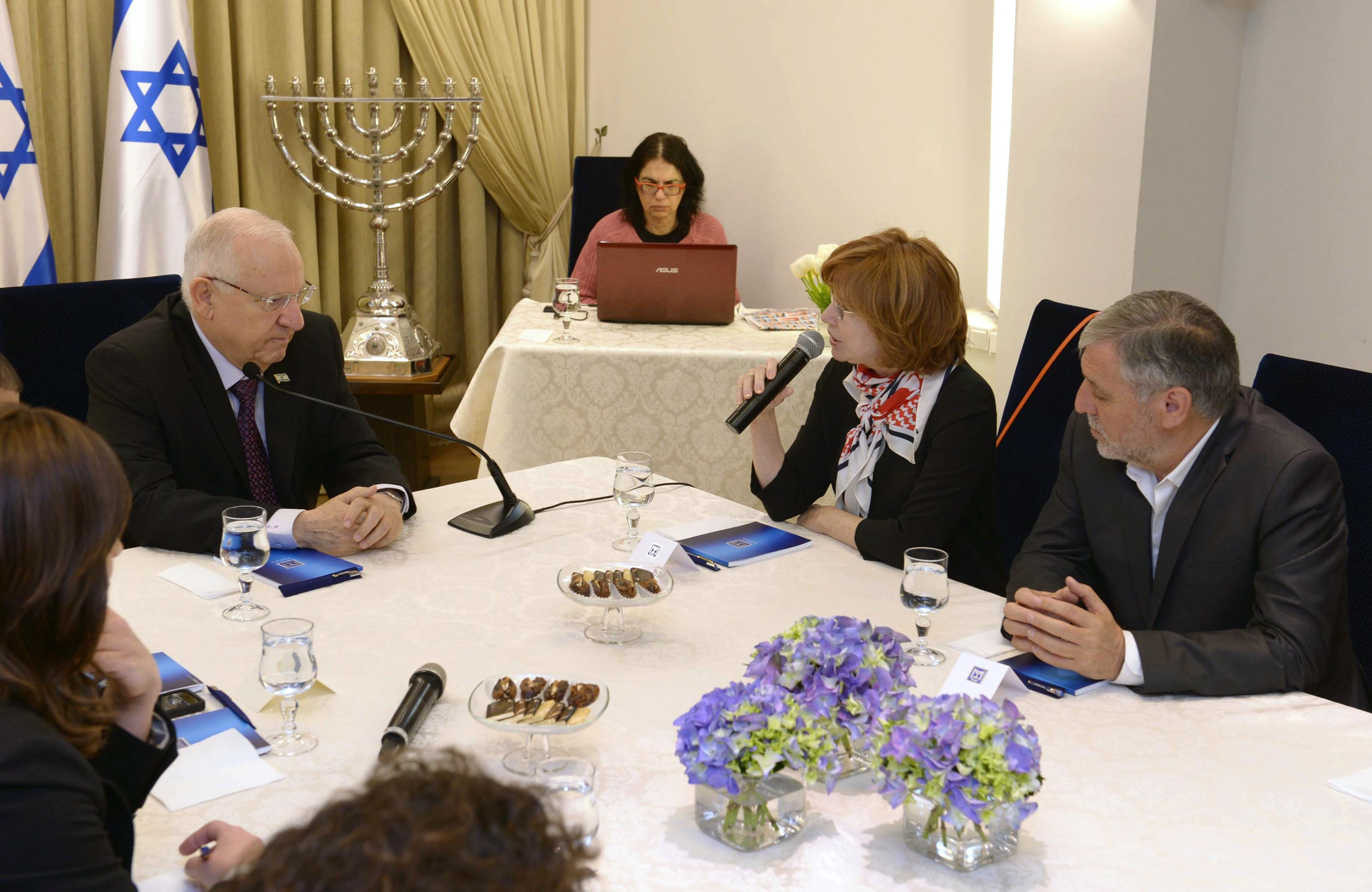 נשיא מדינת ישראל ראובן ריבלין פותח בהתייעצויות עם המפלגות השונות לקראת הרכבת הממשלה לאחר בחירות מרץ 2015 עם יש עתיד